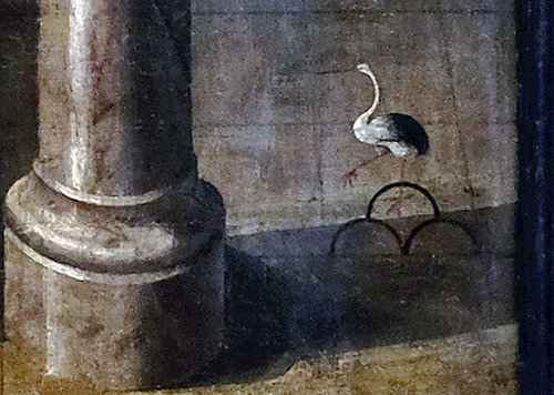 Détail (coin bas droit) représentant une cigogne, possible signature de l'artiste.